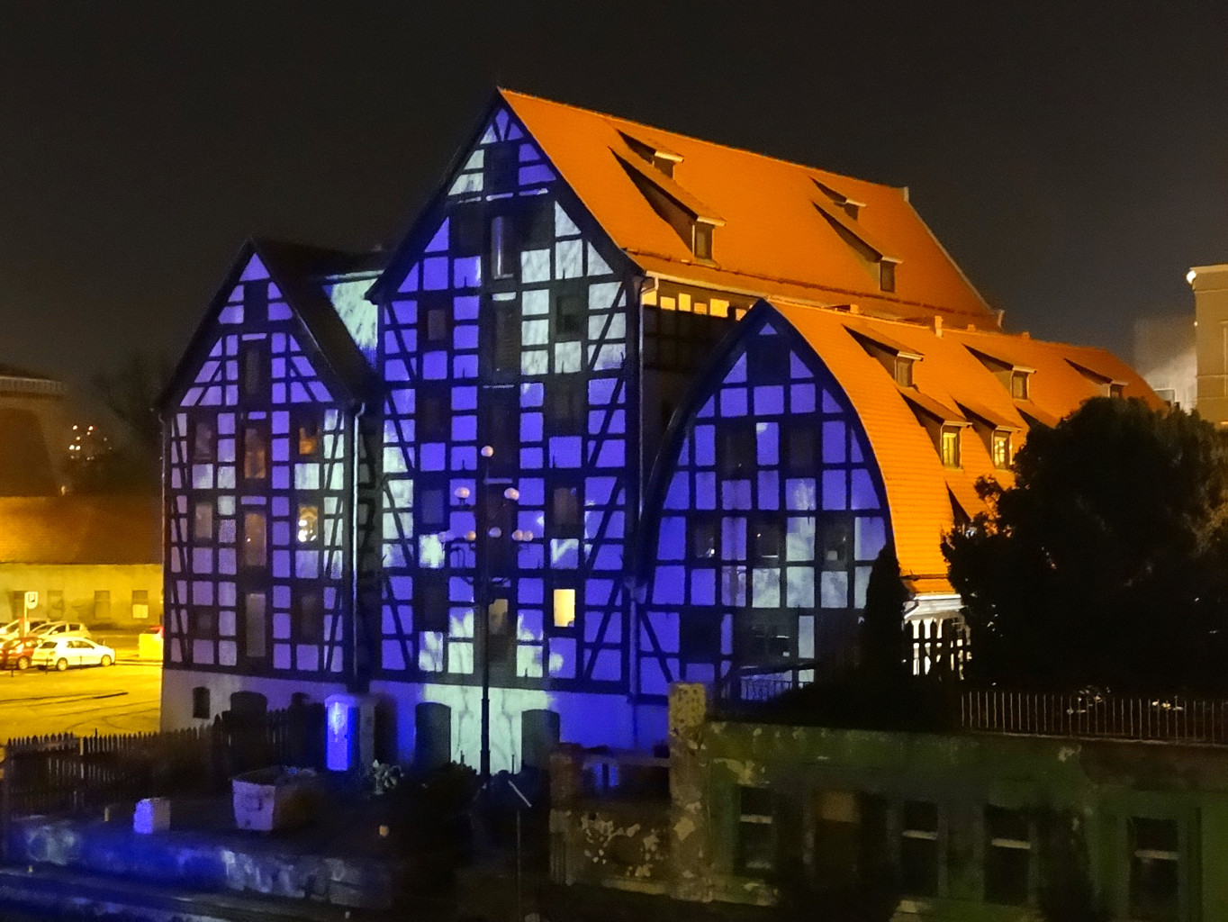 Spichrze przy ul. Grodzkiej nad Brdą w Bydgoszczy w okresie świąt Bożego Narodzenia